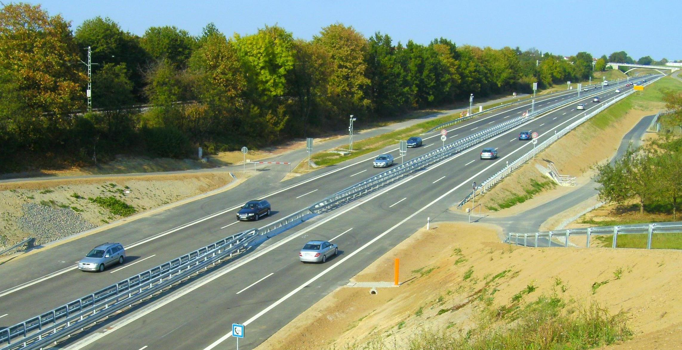 Bundesstraße 14, Ortsumfahrung Winnenden: Trasse durch das Rotbachtal